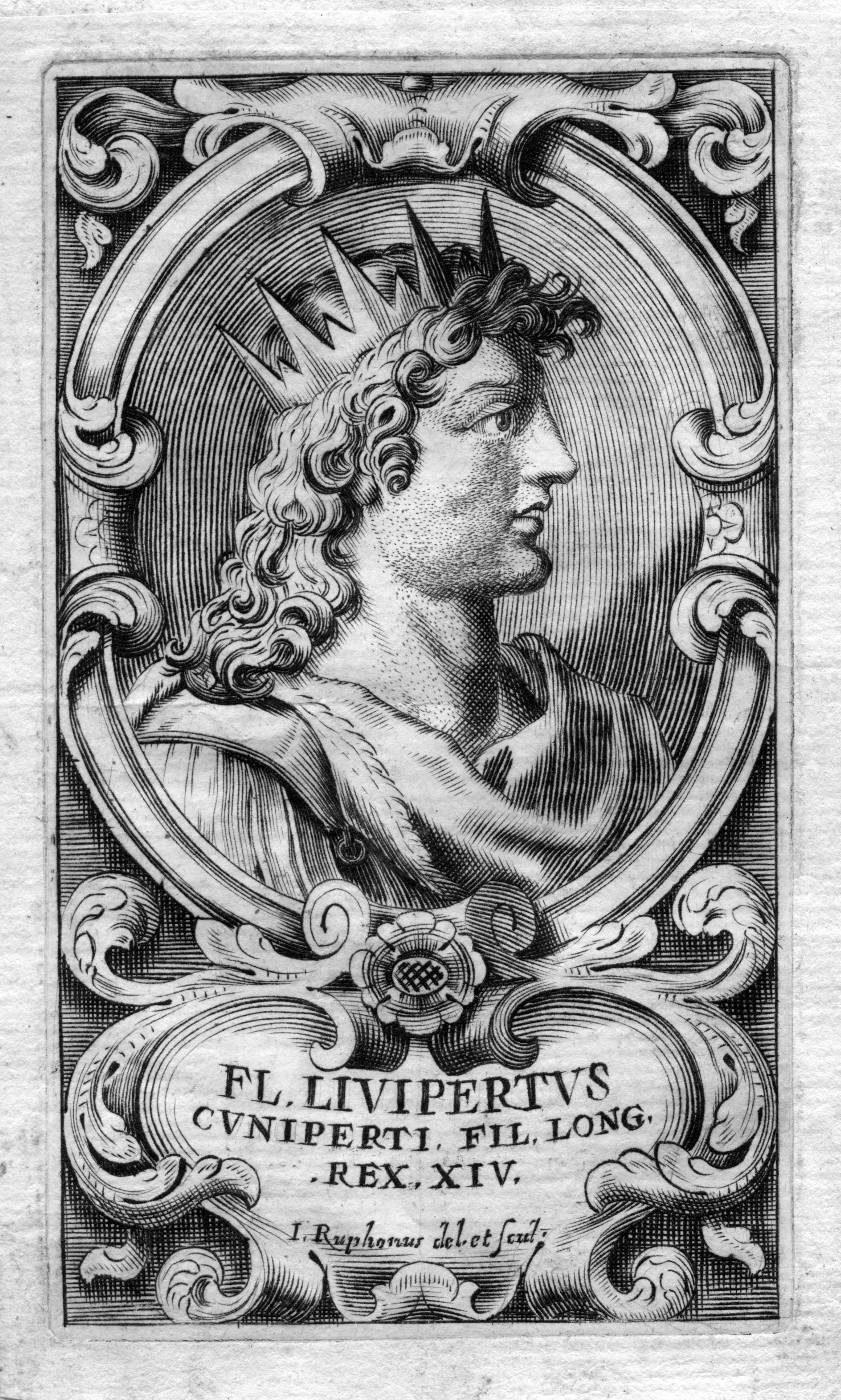 portrait gravé